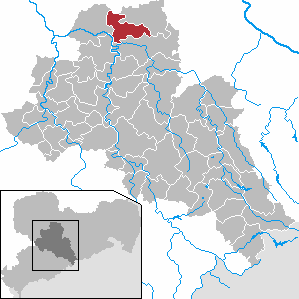 Großweitzschen in Saxony - district Mittelsachsen